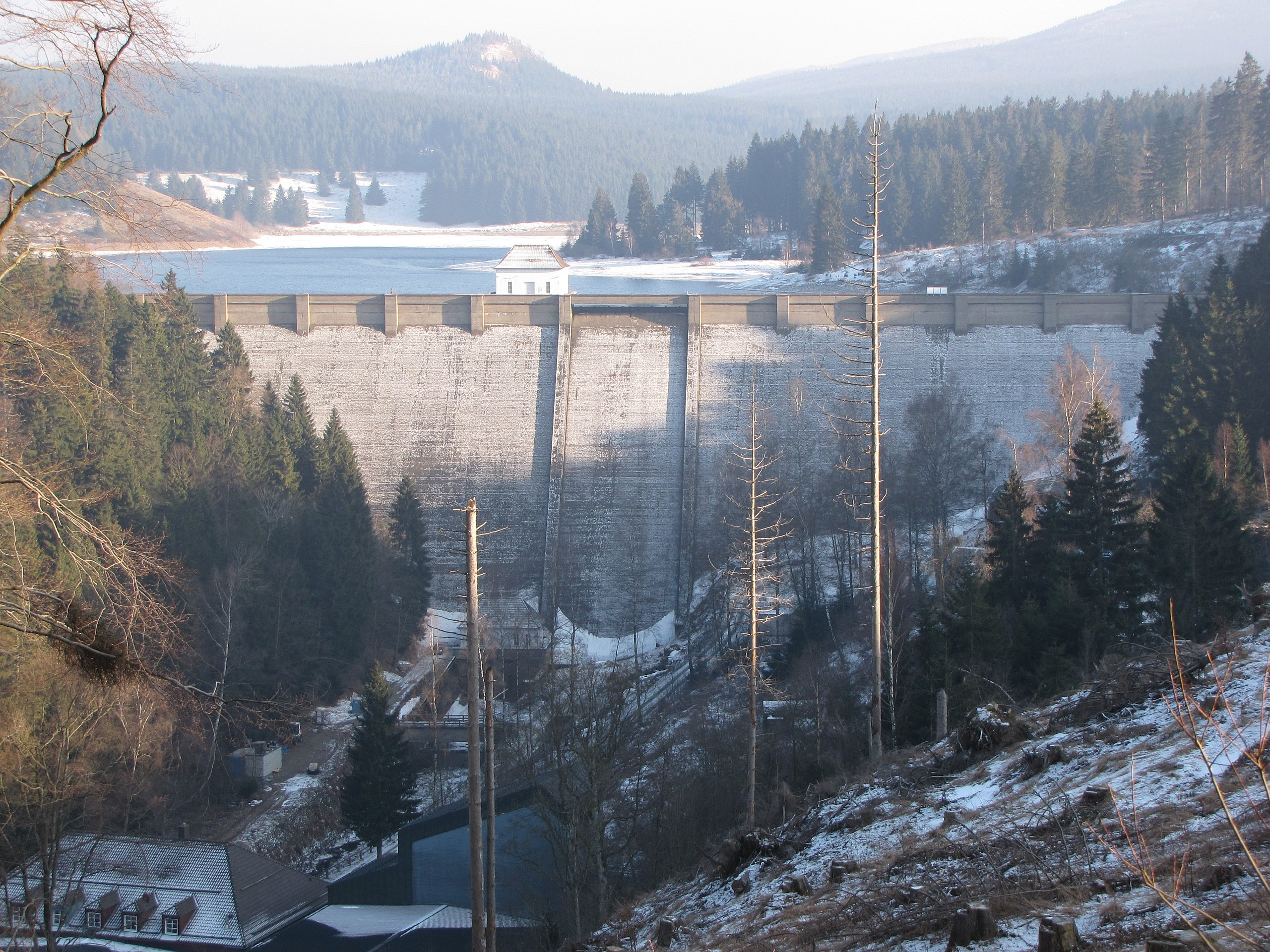 Staumauer der Eckertalsperre bei Bad Harzburg